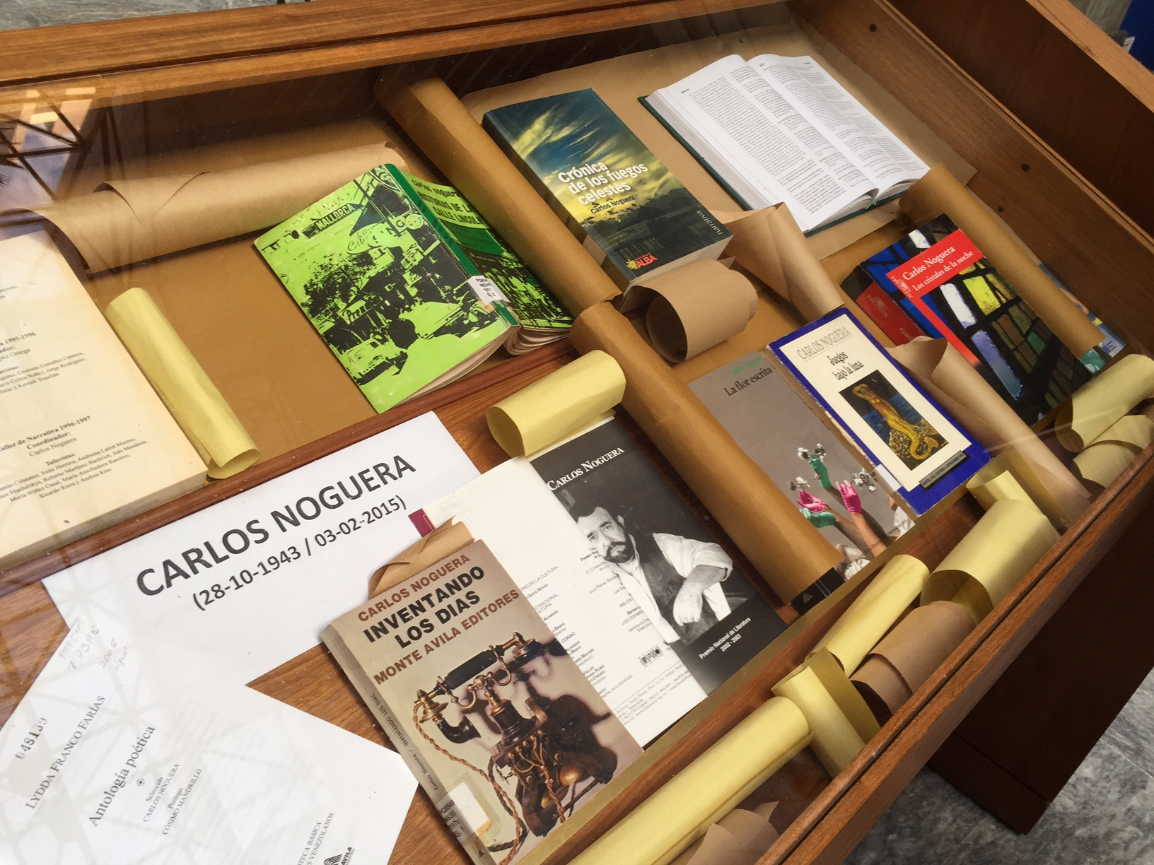 Homenaje al escritor Carlos Noguera en el Centro de Estudios Latinoamericanos Rómulo Gallegos (CELARG). Caracas, Venezuela.